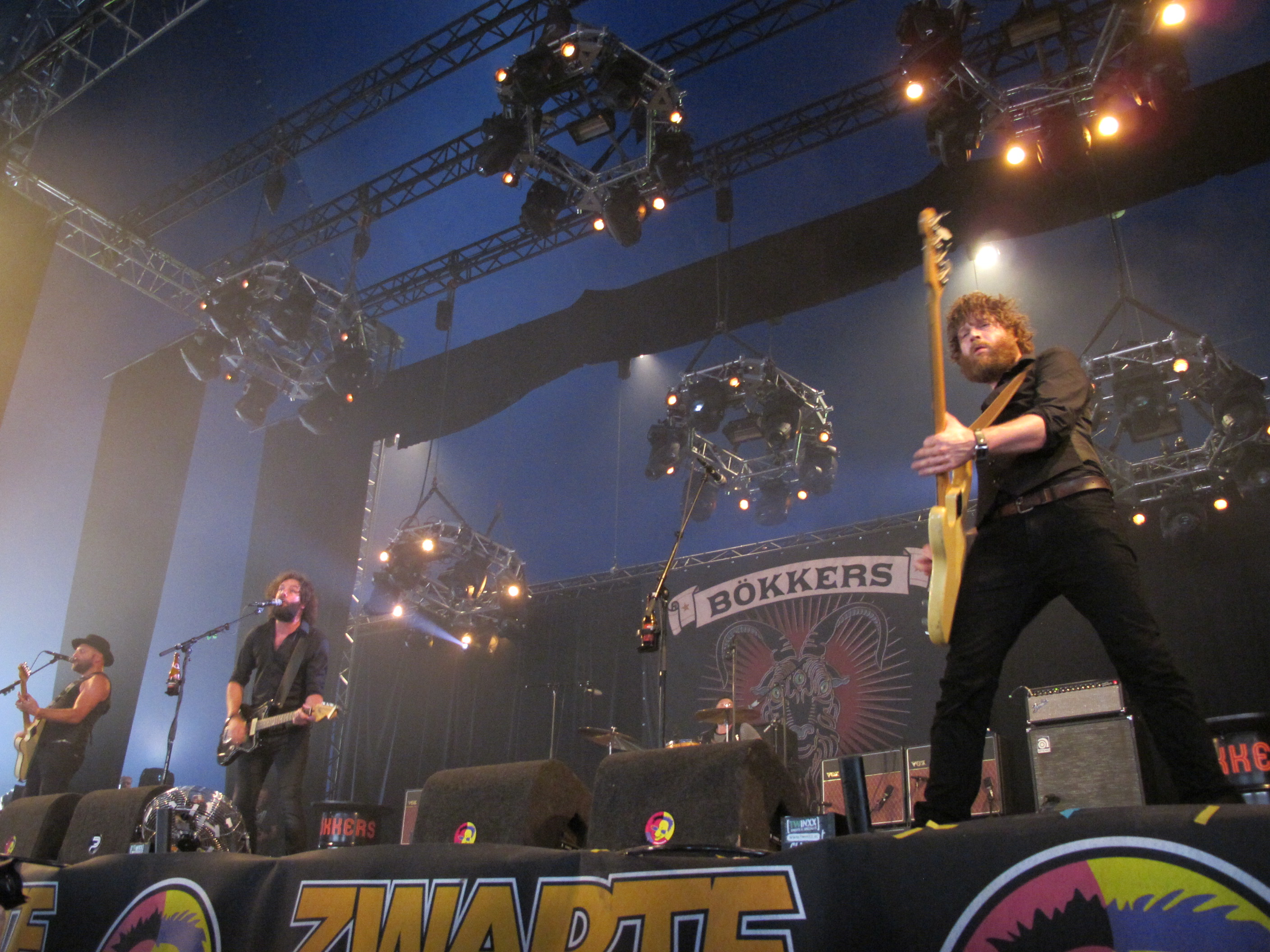 Bökkers op de Zwarte Cross 2016.